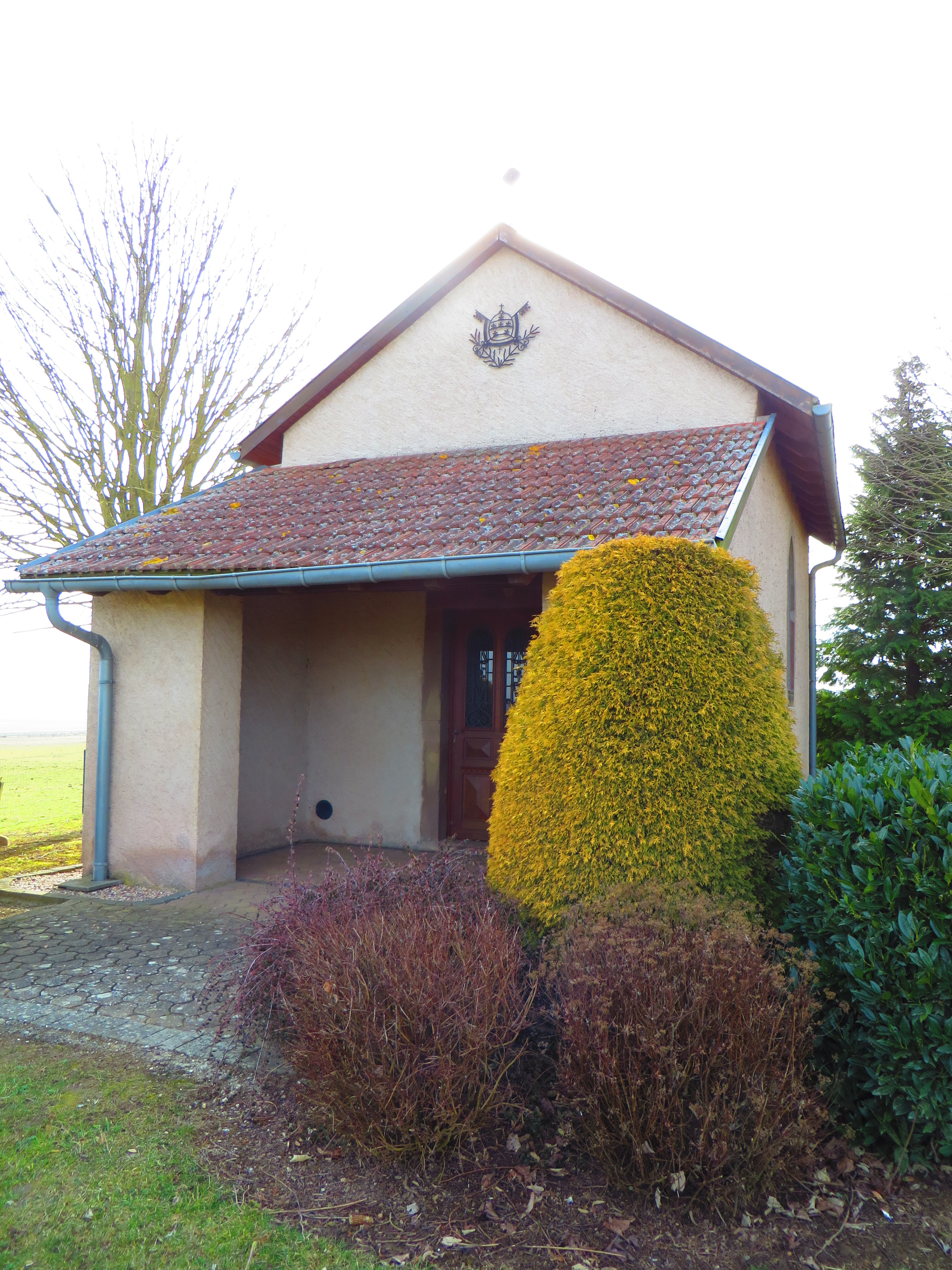 Buhl Lorraine chapelle paul pierre